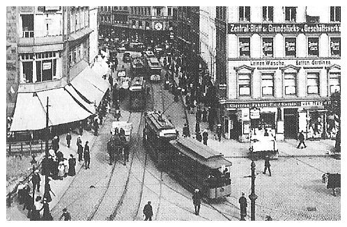 Straßenbahn am Großen Burstah in Hamburg-Altstadt (Dateibezeichnung insoweit falsch).